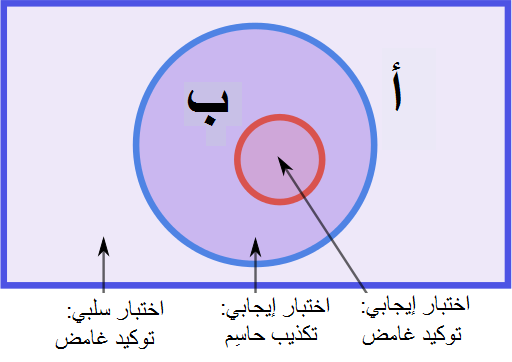 عندما يكون الافتراض السائِد (أ) يتَضمَّن القاعدة (ب) فالاختبارات الإيجابية هي الطريقة الوحيدة لنَفي أ.